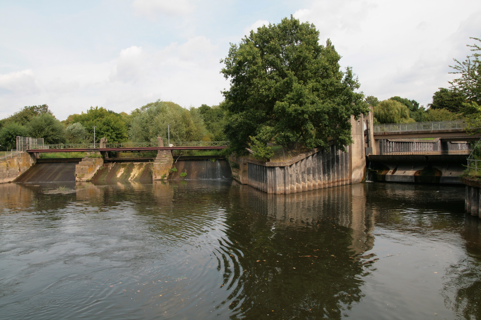 Schneller Graben in Hannover, Niedersachsen, Deutschland.